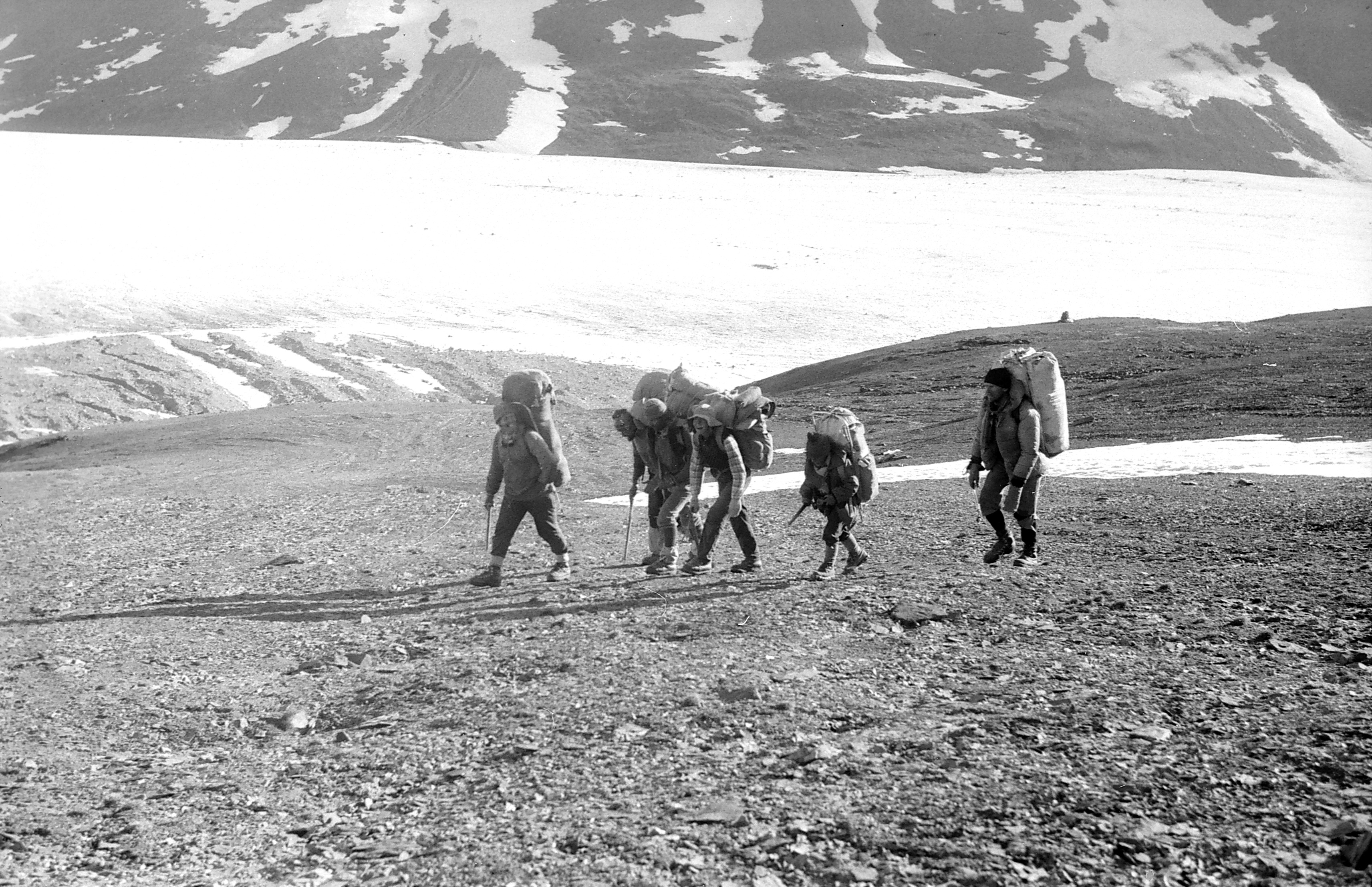 Ekspeditsioon mäetipule "Tartu Ülikool 350".